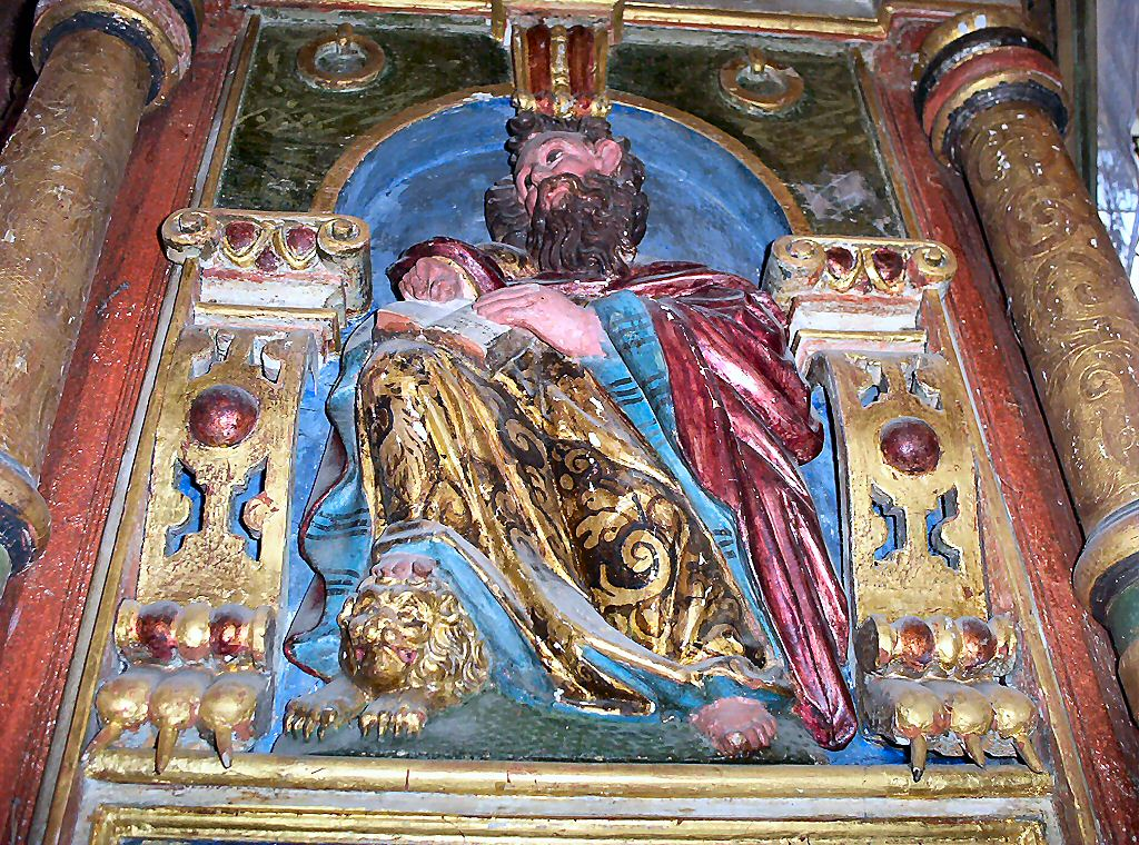 Kościół w Brzesku koło Pyrzyc - ambona